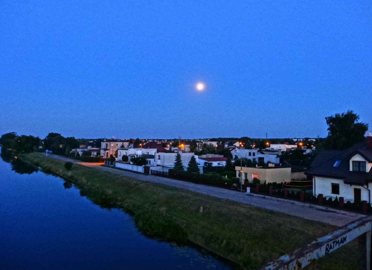 Osiedle Miedzyń w Bydgoszczy - widok z kładki nad Kanałem Bydgoskim